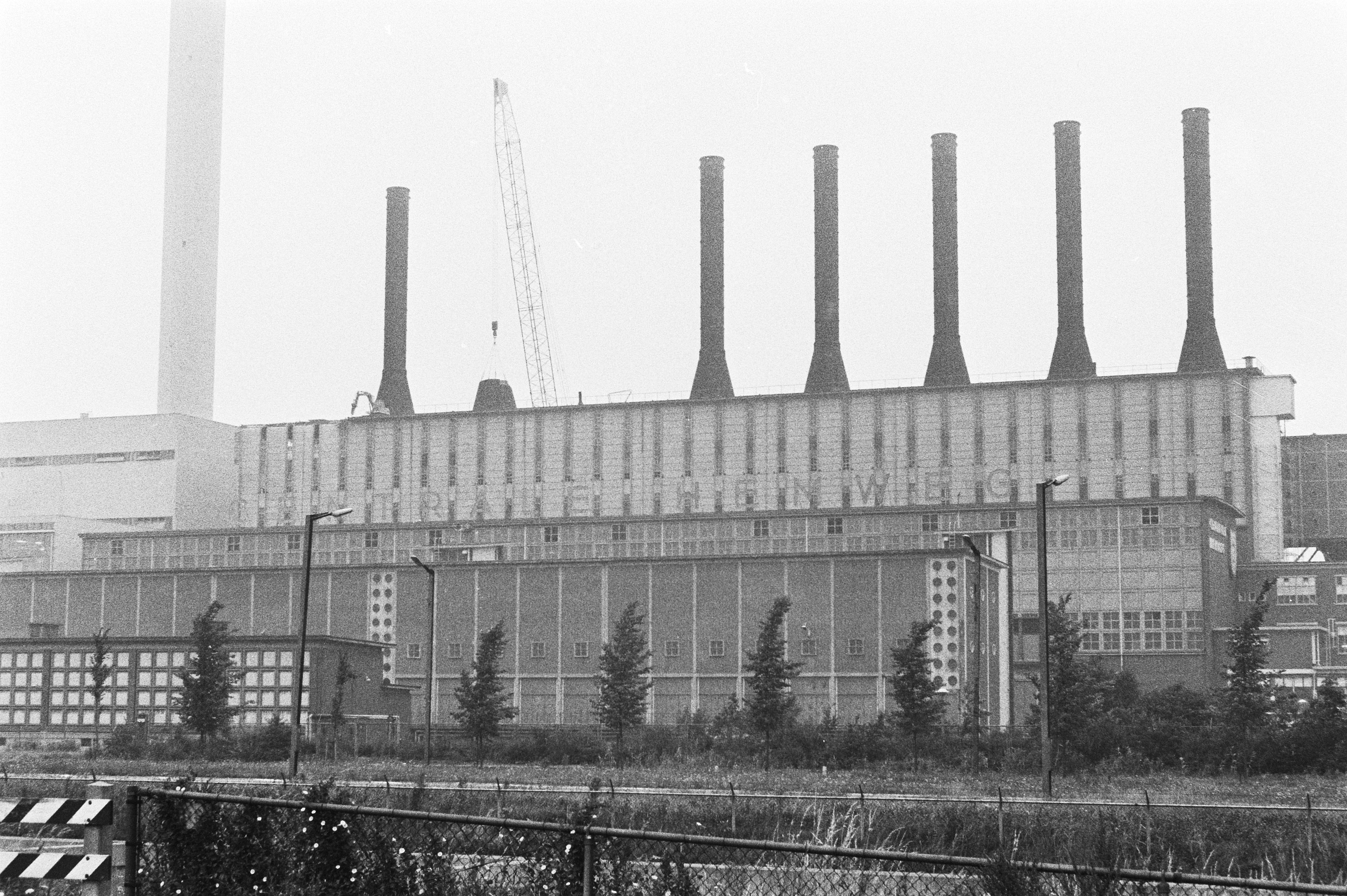 Collectie / Archief : Fotocollectie Anefo Reportage / Serie : [ onbekend ] Beschrijving : Sloop pijpen van de Hemweg-centrale Datum : 28 augustus 1980 Locatie : Amsterdam, Noord-Holland Trefwoorden : centrales, schoorstenen, sloop Fotograaf : Dijk, Hans van / Anefo Auteursrechthebbende : Nationaal Archief Materiaalsoort : Negatief (zwart/wit) Nummer archiefinventaris : bekijk toegang 2.24.01.05 Bestanddeelnummer : 930-9845